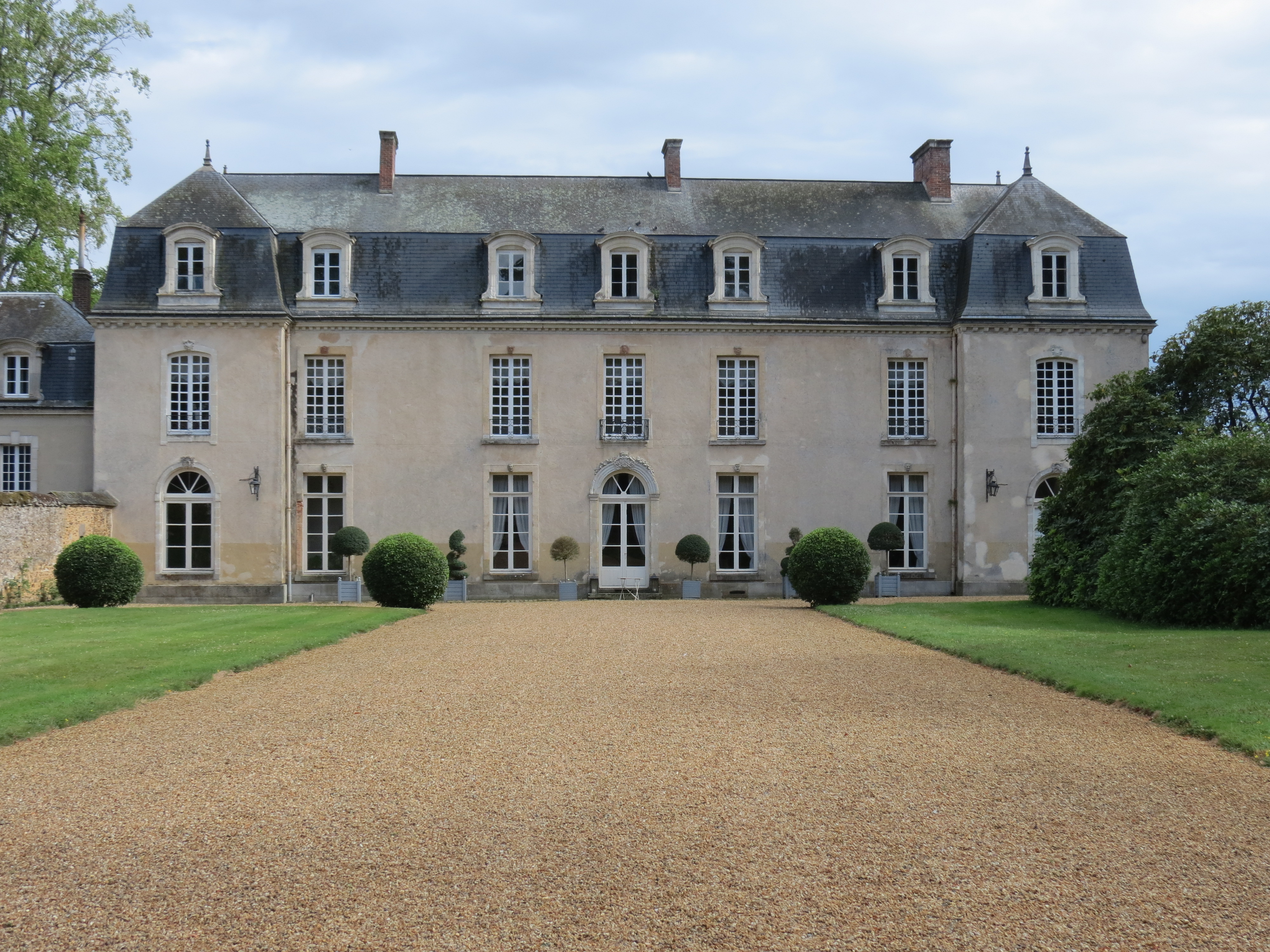 Château de la Groirie, Trangé, Sarthe, Pays de la Loire.